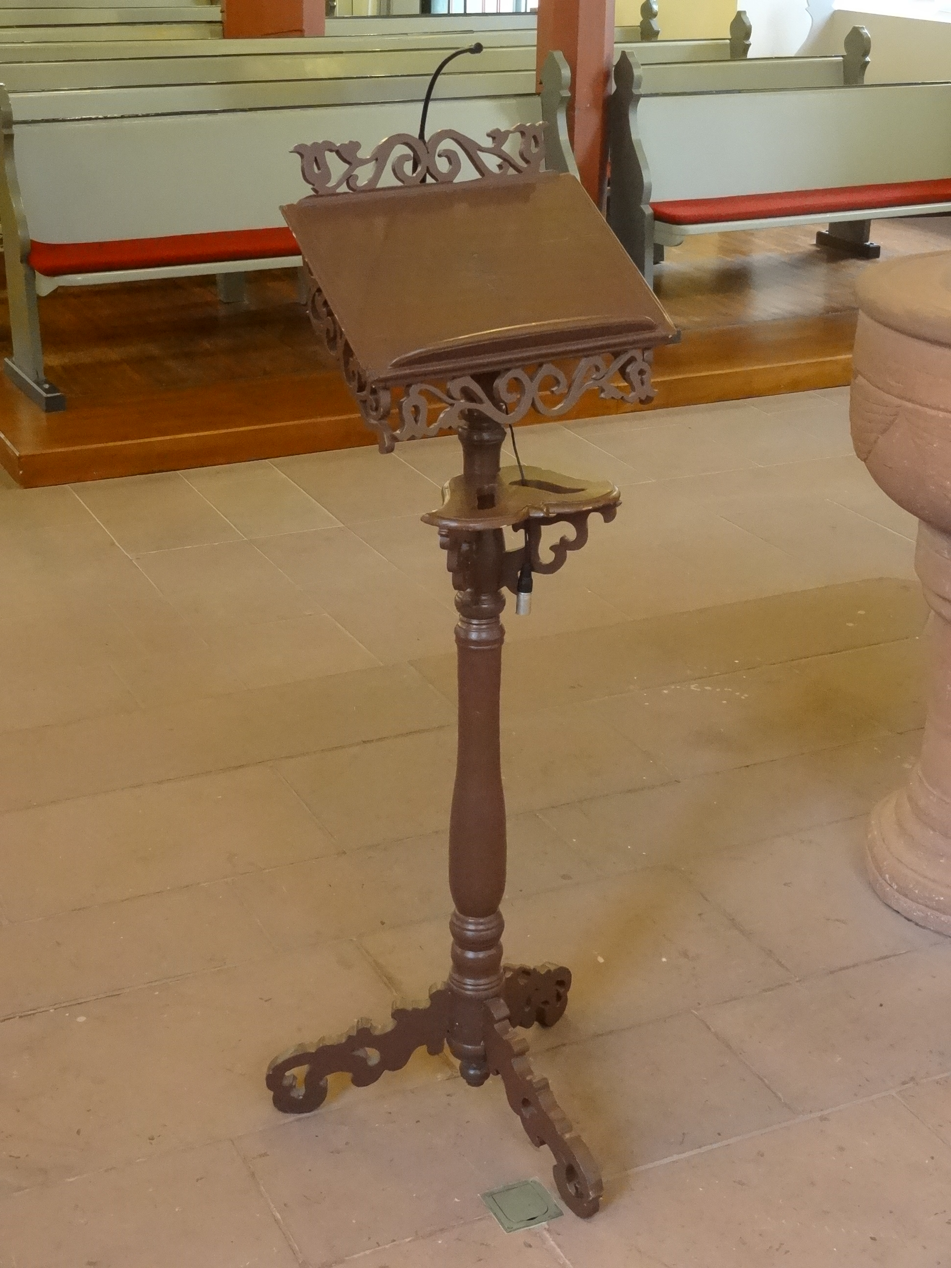 Stadtkirche zum Heiligen Geist (Nidda)